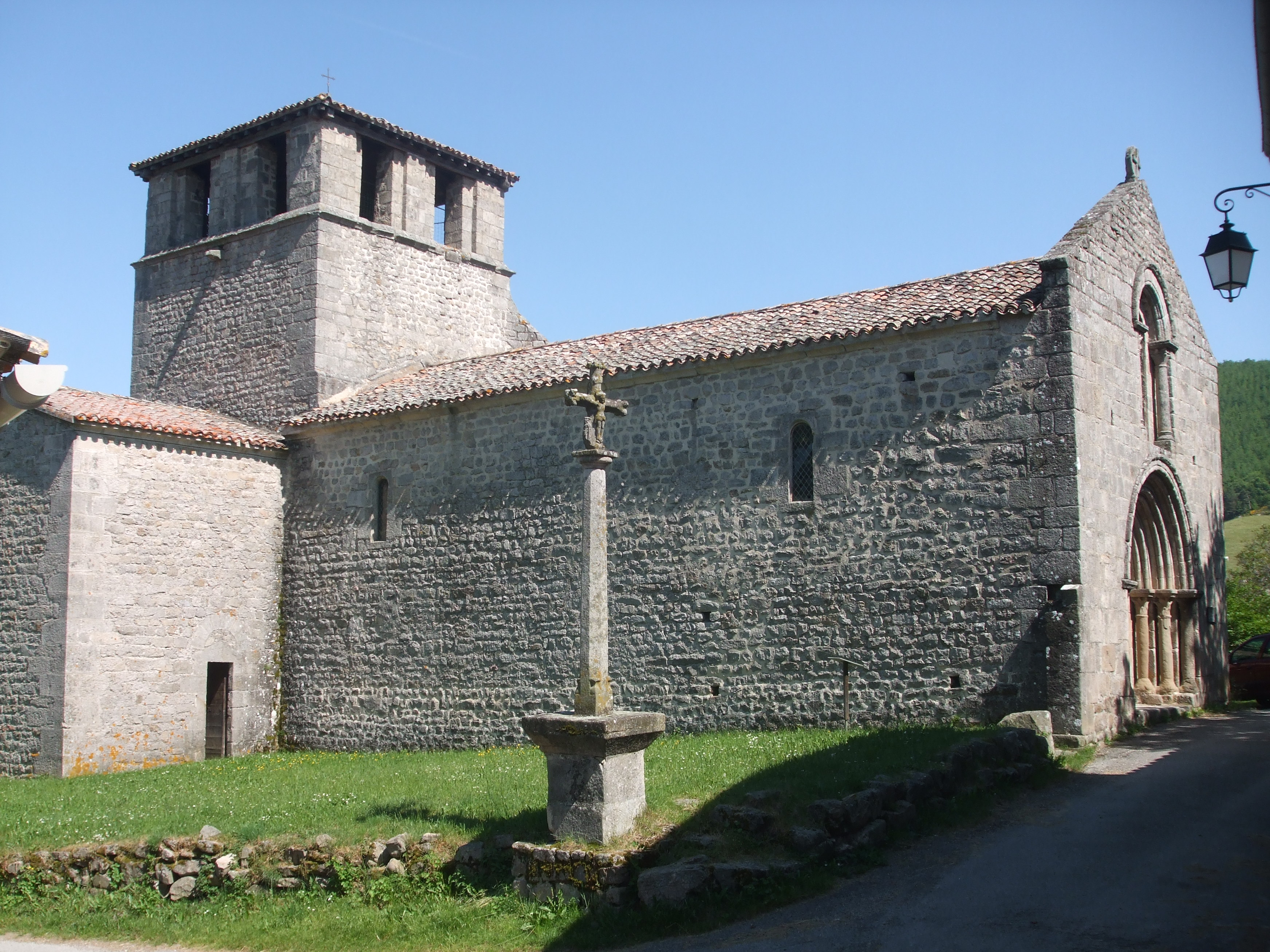 église Notre Dame de Veyrines